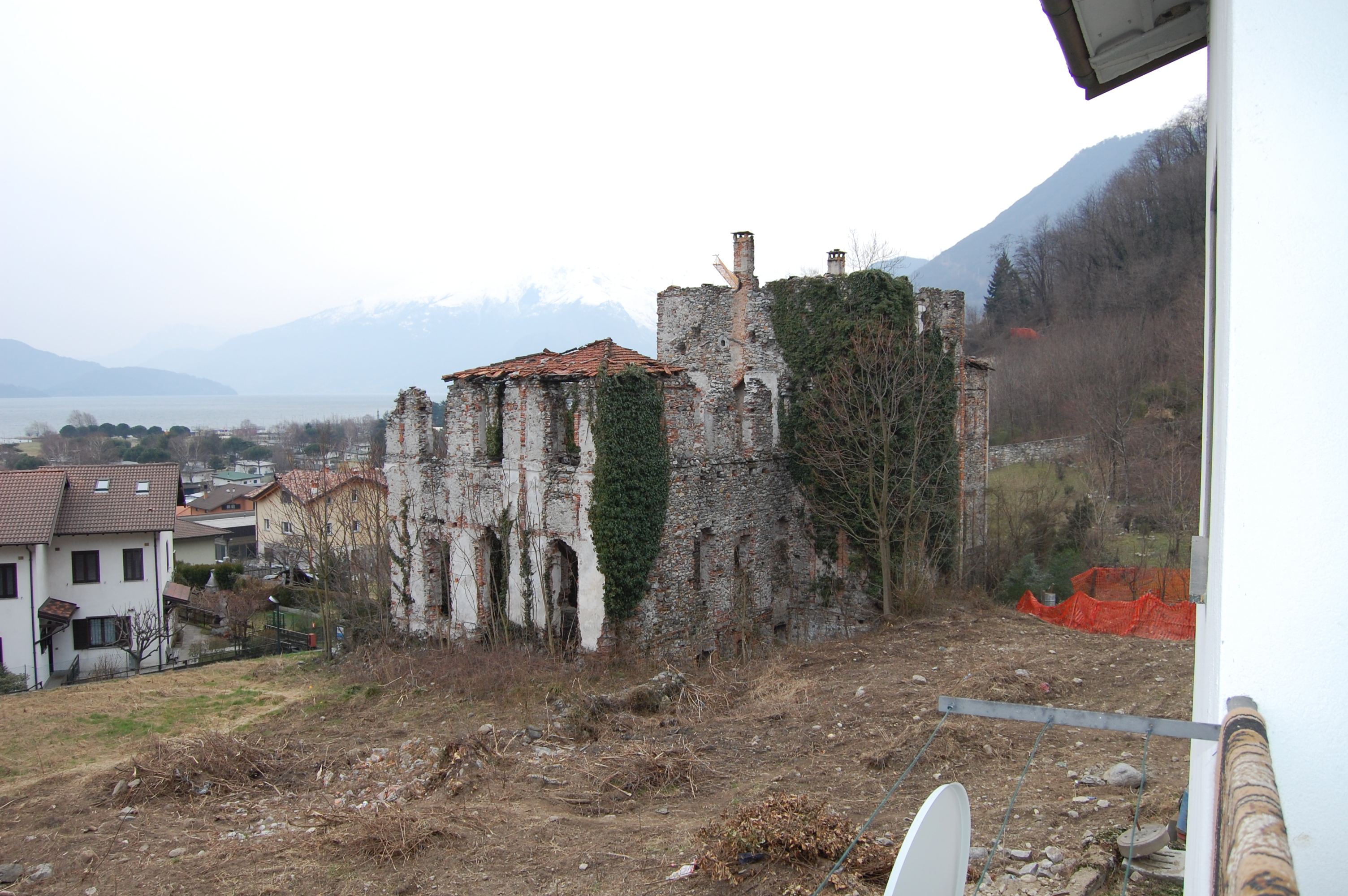 Ala est e fronte nord della villa giulini a sorico